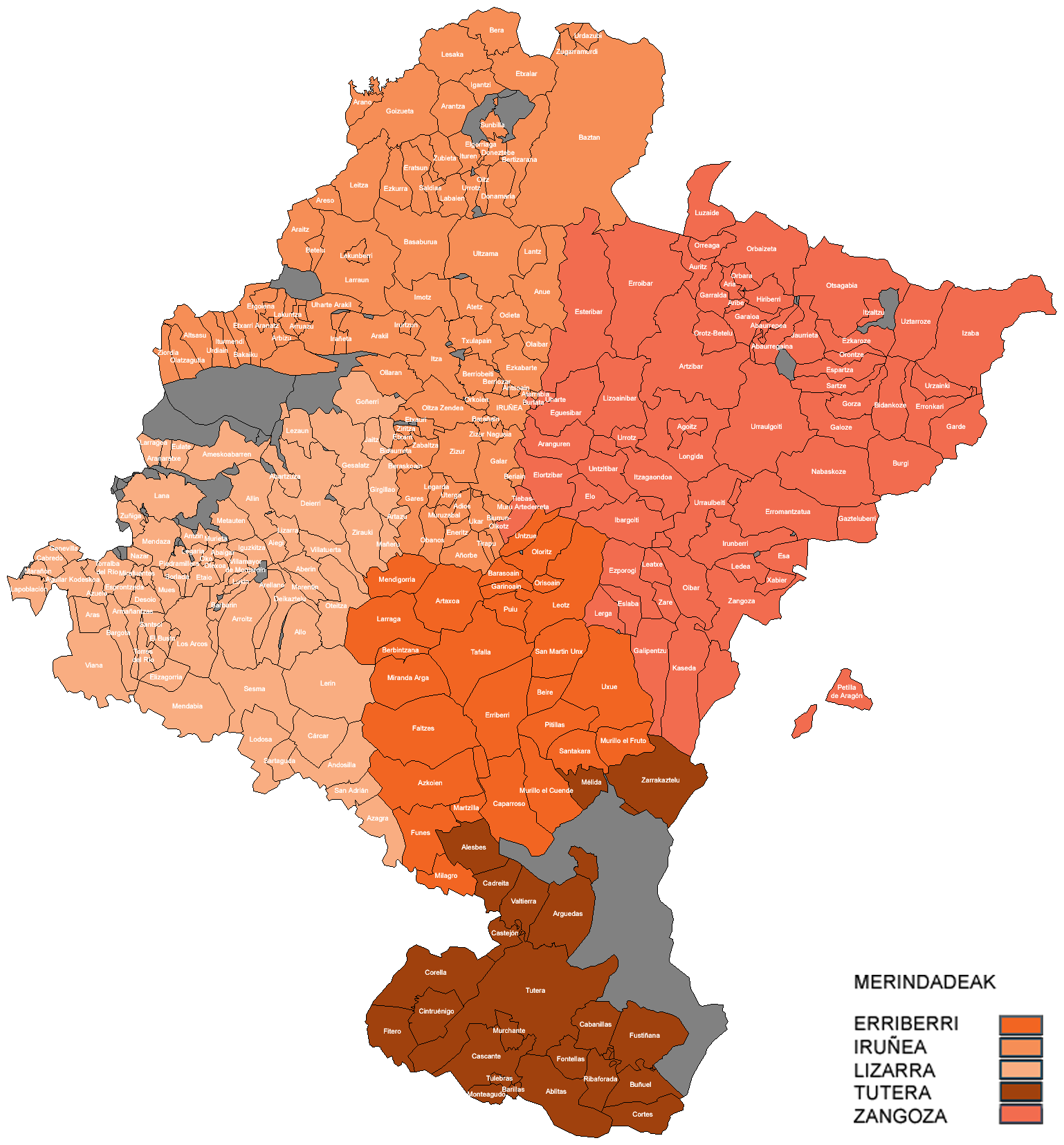 Mapa de Navarra con sus merindades y municipios (nombres en euskera según Euskaltzaindia).